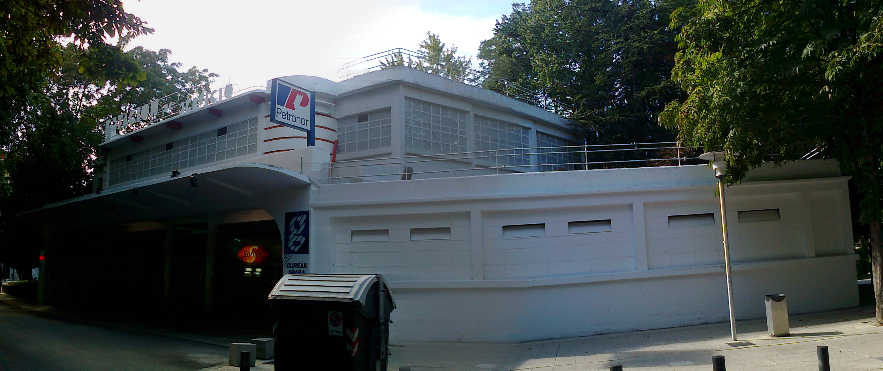 Gasteizko Goia gasolindegia